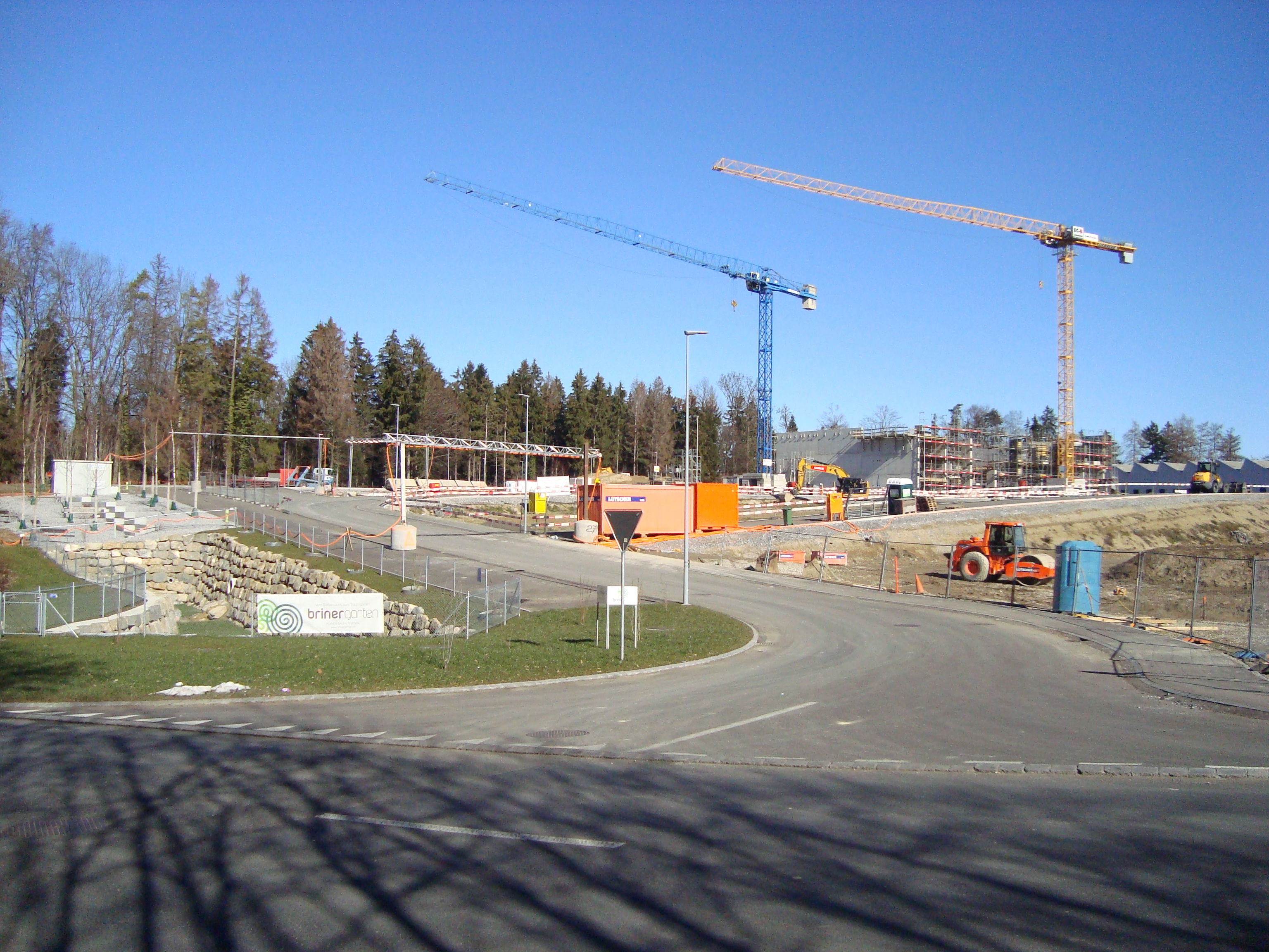 Werkstadt Zürichsee in der Stadt Wädenswil, Gebiet Rütihof, Kanton Zürich, Schweiz